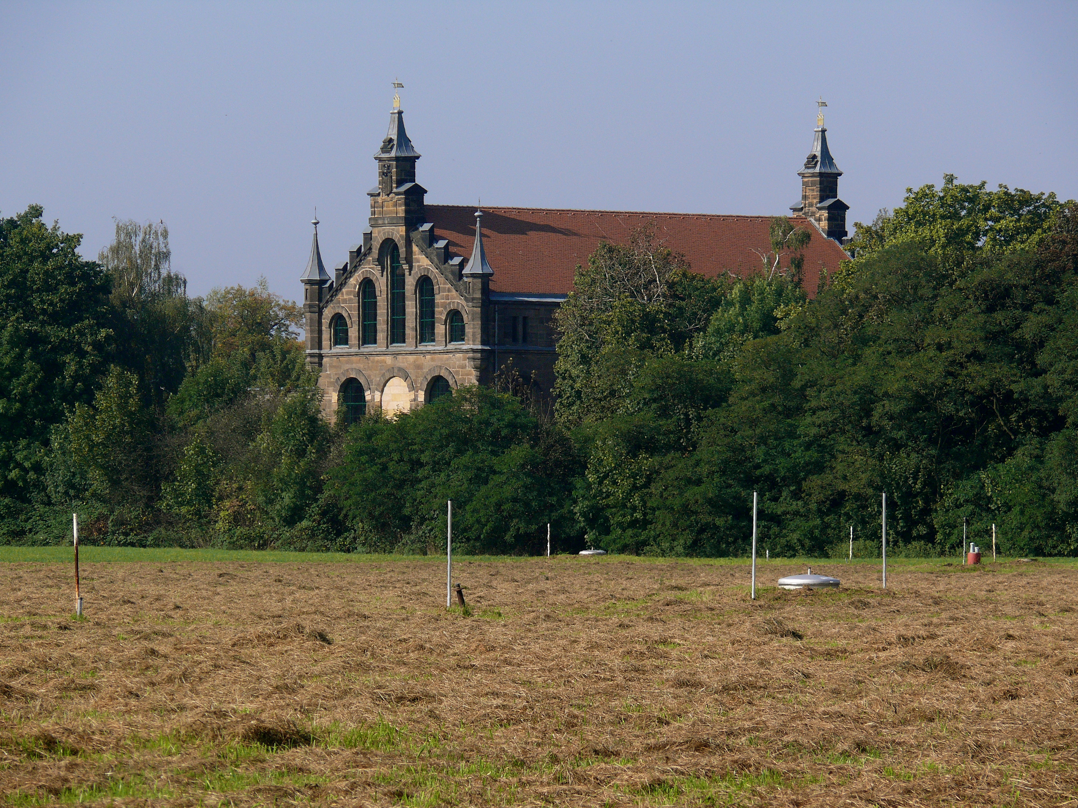 Historisches Wasserwerk in Dresden-Tolkewitz